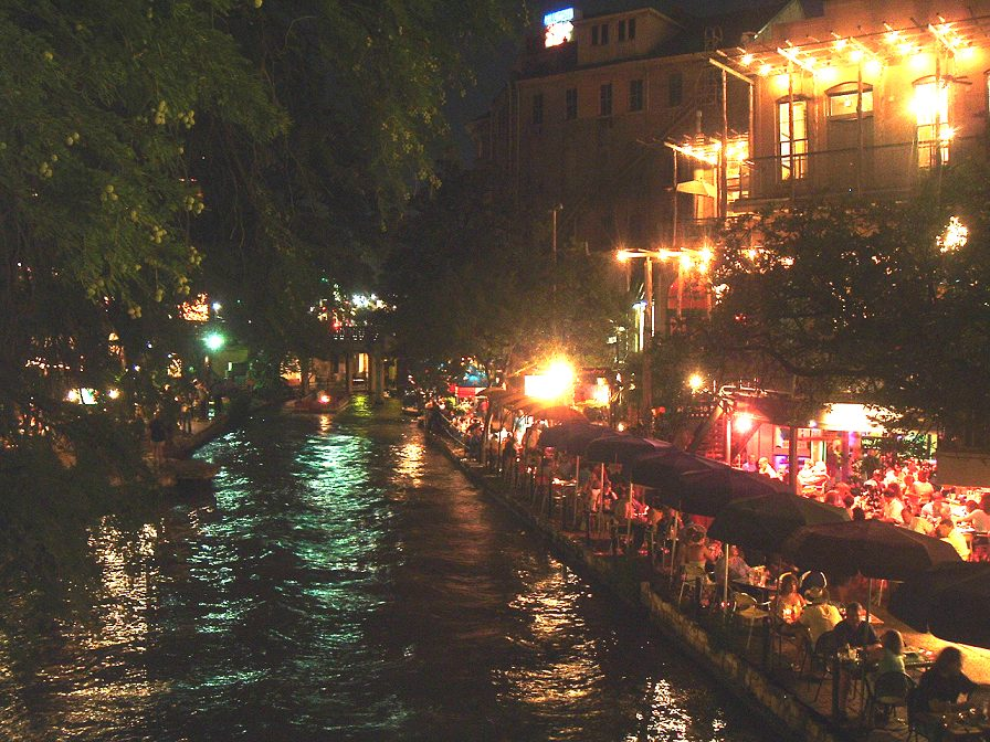 Der Riverwalk bei Nacht, selbst aufgenommen am 5. August 2005